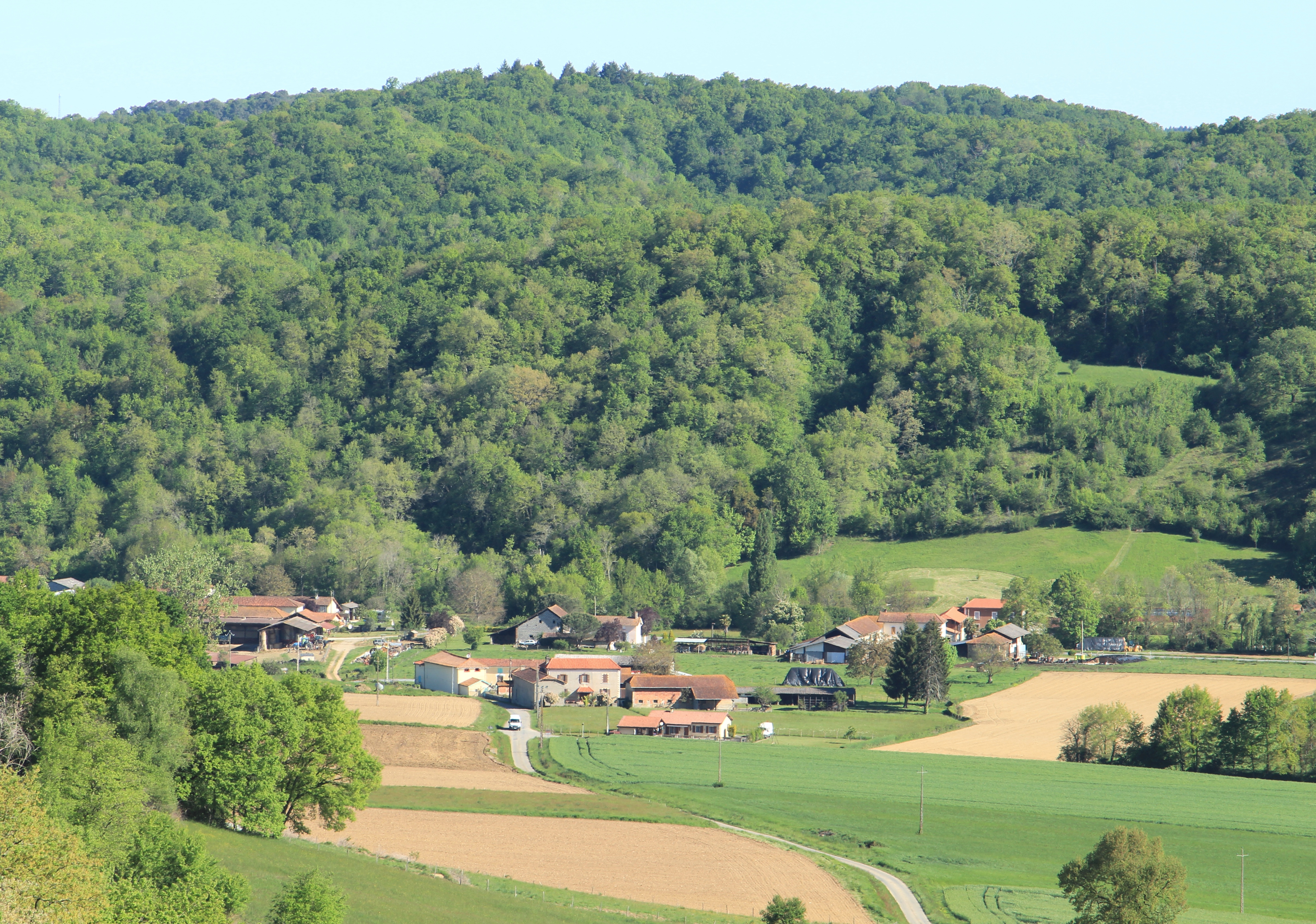 Osmets (Hautes-Pyrénées)